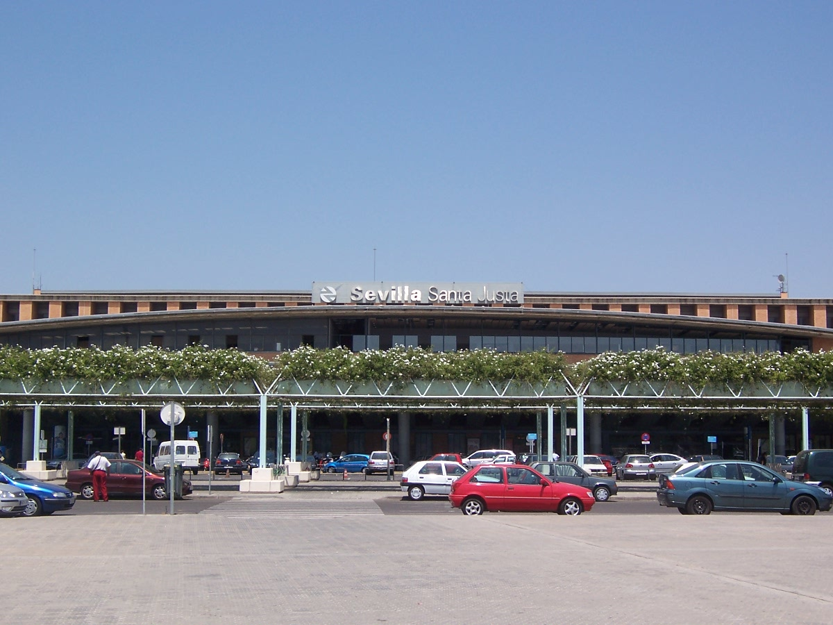 Estación de Santa Justa camera: Kodak DX7440